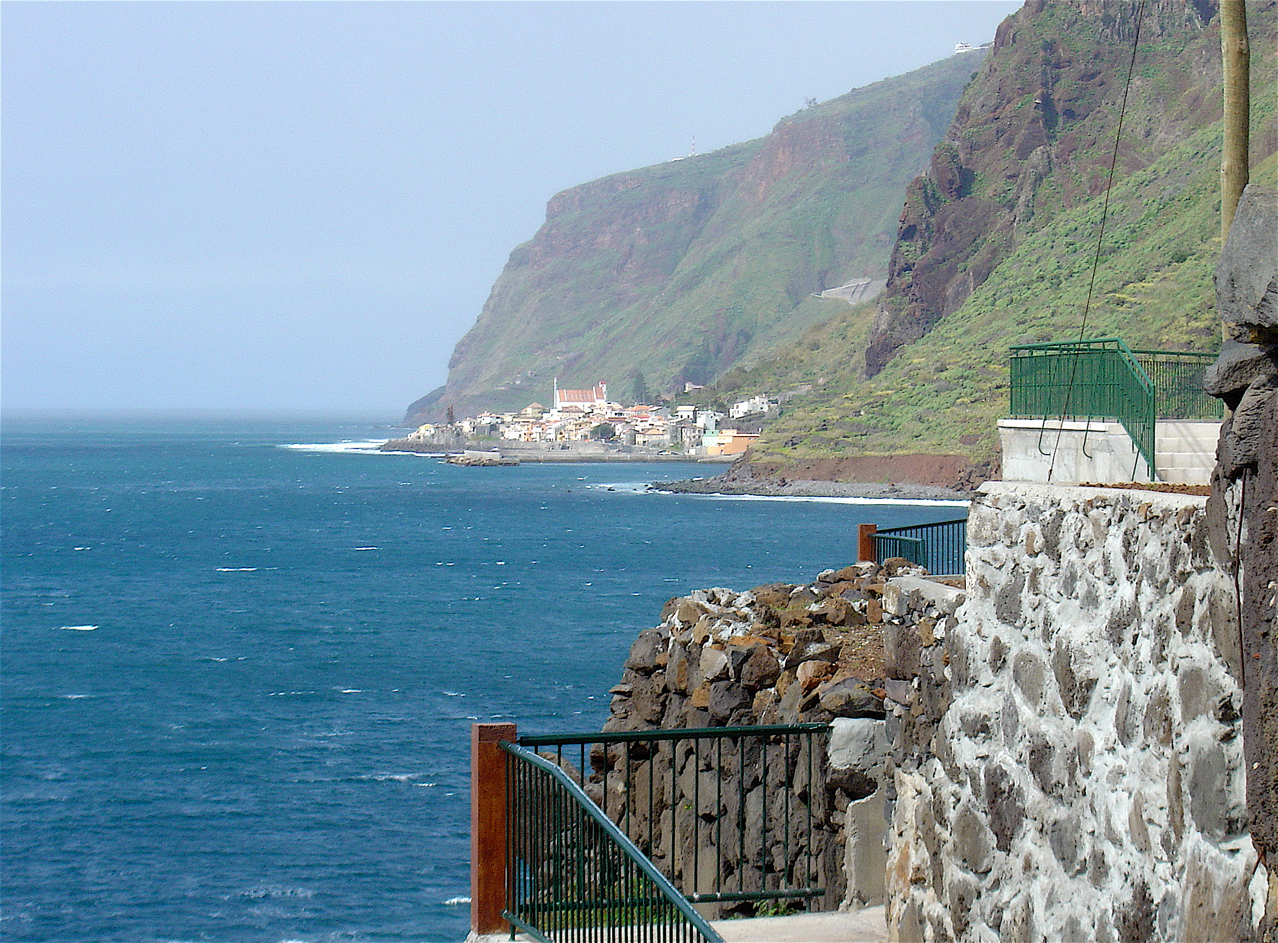 Blick auf Paul do Mar von Jardim do Mar